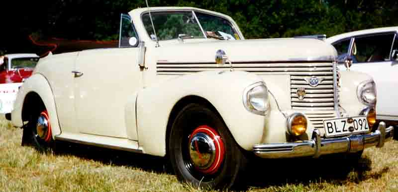 Opel Kapitän Cabriolet 1939